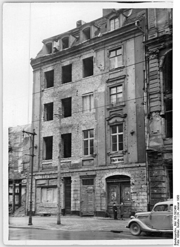 Illus Köhler- 24.1.1950 Das letzte "Frey-Haus" von Berlin. Das Haus Breitestr. 3 ist das letzte "Frey-Haus", das Berlin jetzt noch besitzt. Die Freihäuser verdanken ihre Entstehung einer Verfügung des Kurfürsten Friedrich II, der 1451 zur besseren Verteidigung seiner Burg die Freihäuser schuf. Die Insassen brauchten keine Steuern zu zahlen, mußten dafür aber den Schloßbewohnern im Notfalle bewaffnete Hilfe leisten. 5157-50